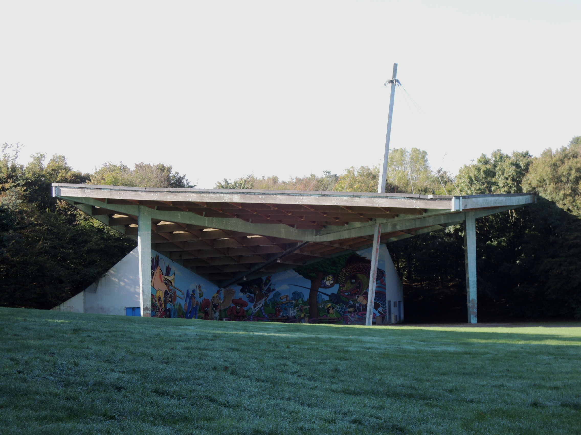 Parc des Gayeulles à Rennes. Octobre 2013.